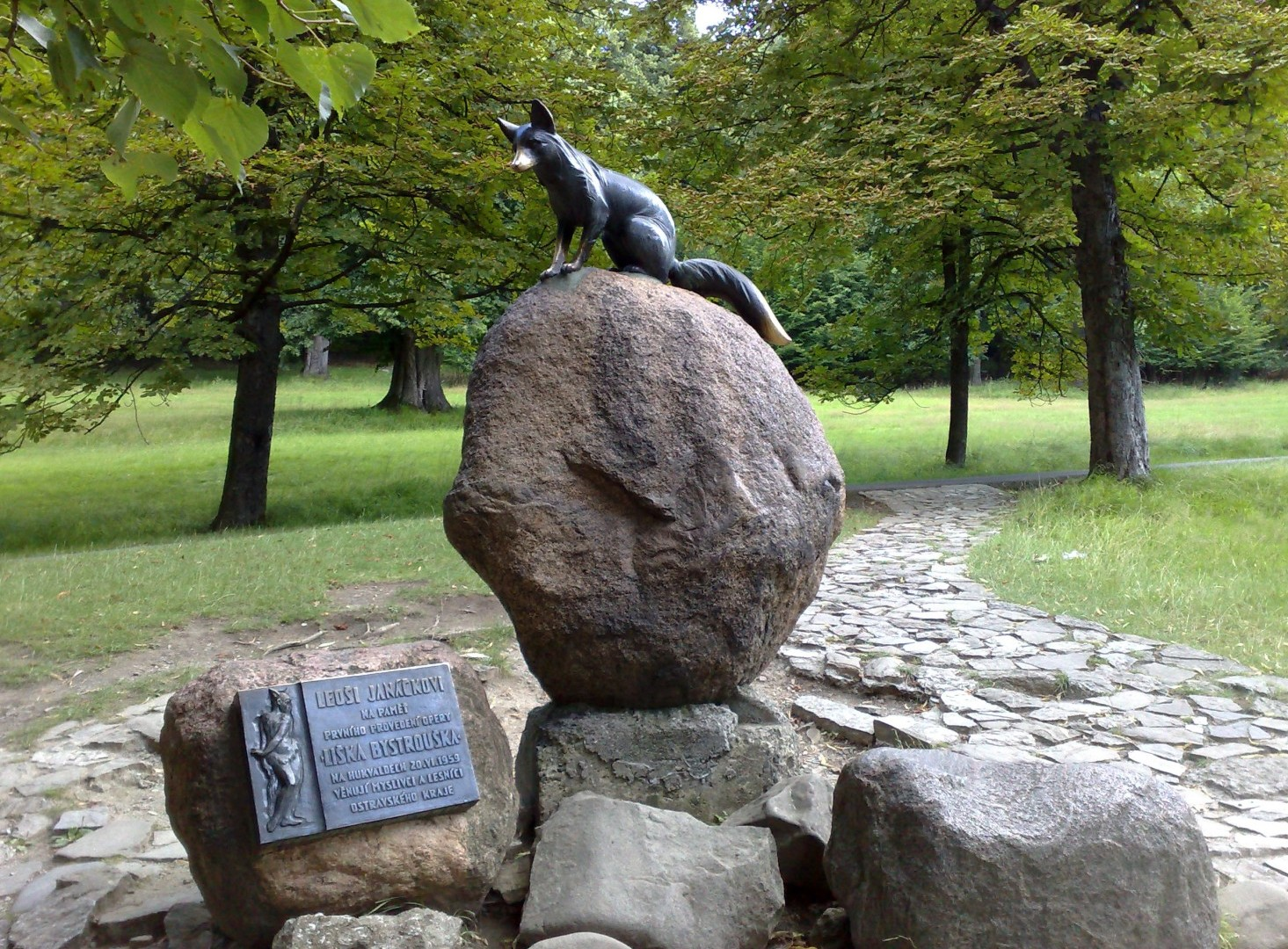 liška Bystrouška